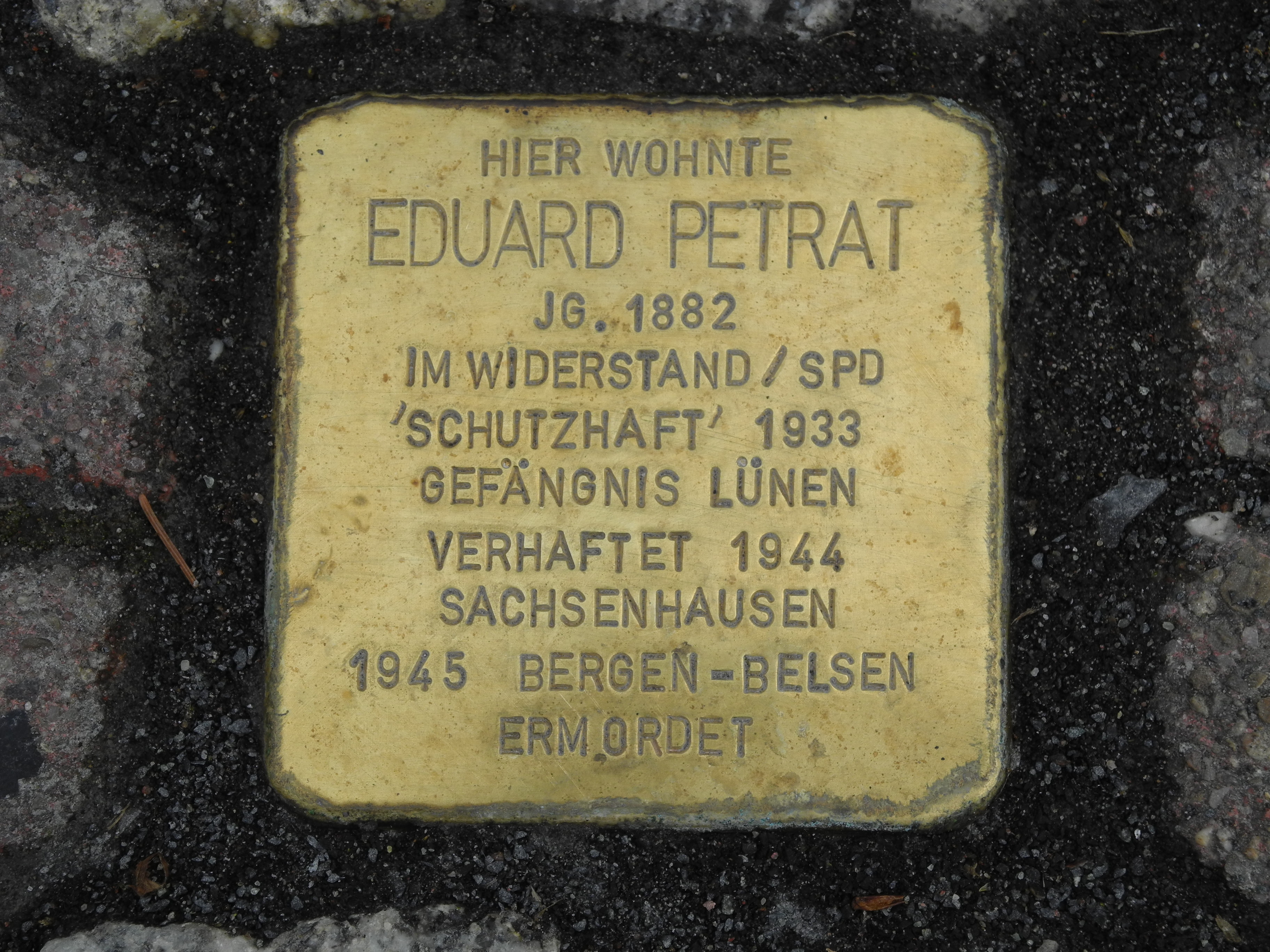 Stolperstein seit 2014 in Lünen Eduard Petrat